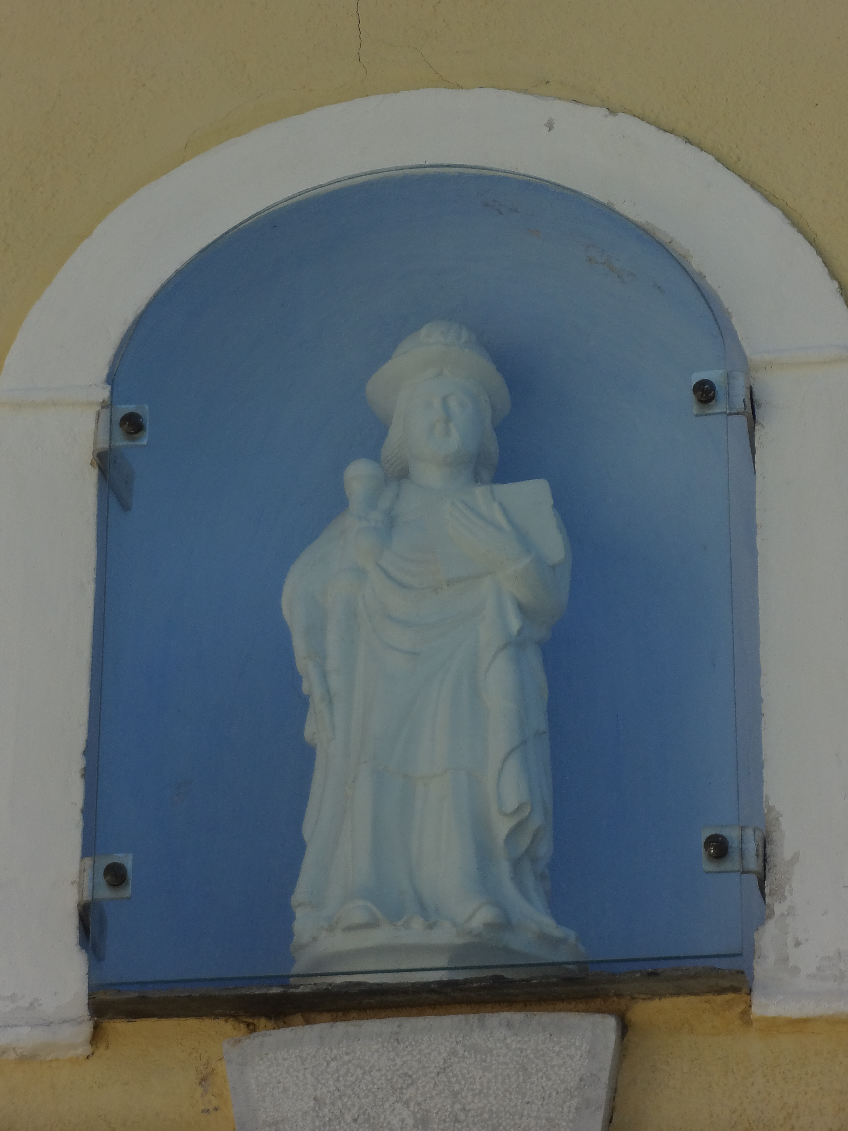 Copie probable d'une statuette gothique